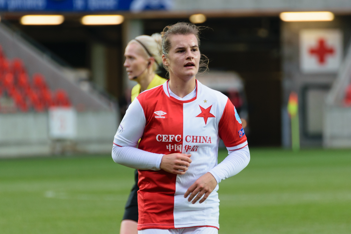 Tereza Szewieczková during Slavia vs VfL Wolfsburg